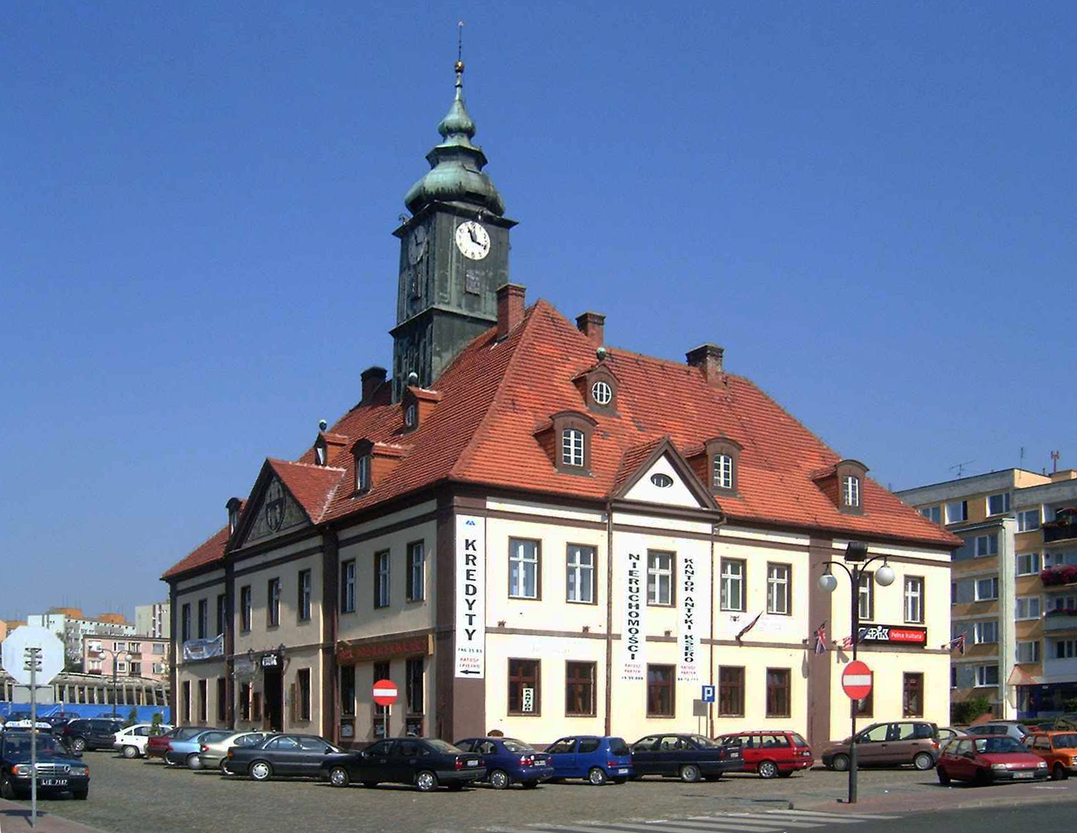 Lubin, ratusz